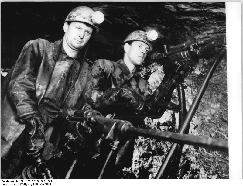 Freiberg, Zeche "Albert Funk", Bergarbeiter bohrend Zentralbild Thieme 30.5.68 Karl-Marx-Stadt: 700 Jahre Zinnerzförderung in Ehrenfriedersdorf Die Kumpel des VEB Bergbau- und Hüttenkombinat "Albert Funk" Freiberg, Betriebsteil Ehrenfriedersdorf-Erzgeb., feiern in diesem Jahr das 700jährige Jubiläum des Erzbergbaues in ihrer Stadt. Zu den Schrittmachern der Zinnerzgurbe gehört die Brigade Zinner, die in den ersten vier Monaten dieses Jahres im Streckenvertrieb 40 Meter über den Plan schaffte und ihren Jahresplan bis zum 15. Dezember erfüllen will. Unser Foto zeigt Heinz Zinner, den Brigadier (links) und den Hauer Wolf Georg Schindler im Vortrieb. Im Wettbewerb zu Ehren des 20. Jahrestages der DDR haben sich die Werktätigen des Betriebes vorgenommen, 1958 die größte Zinnerzmenge zu fördern. Bereits im Vorjahr konnte der Betirebsteil die Jahresproduktion mit 103, 8% übererfüllen.